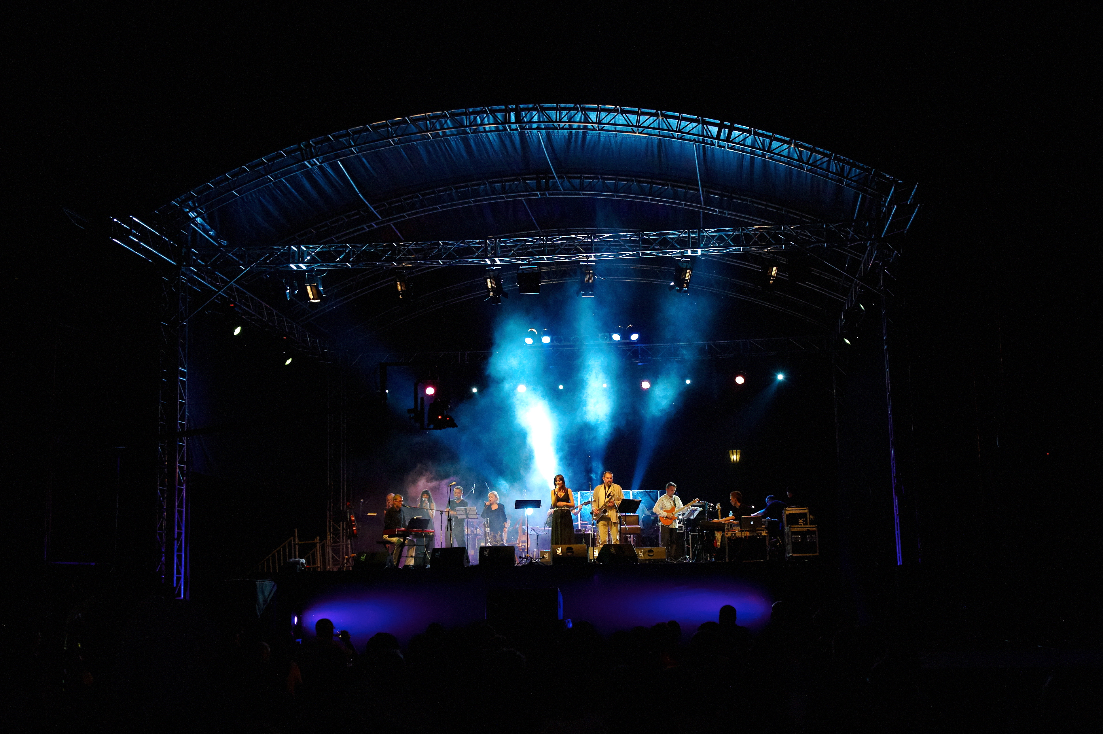 Śrubki - koncert Forty Kleparz 3